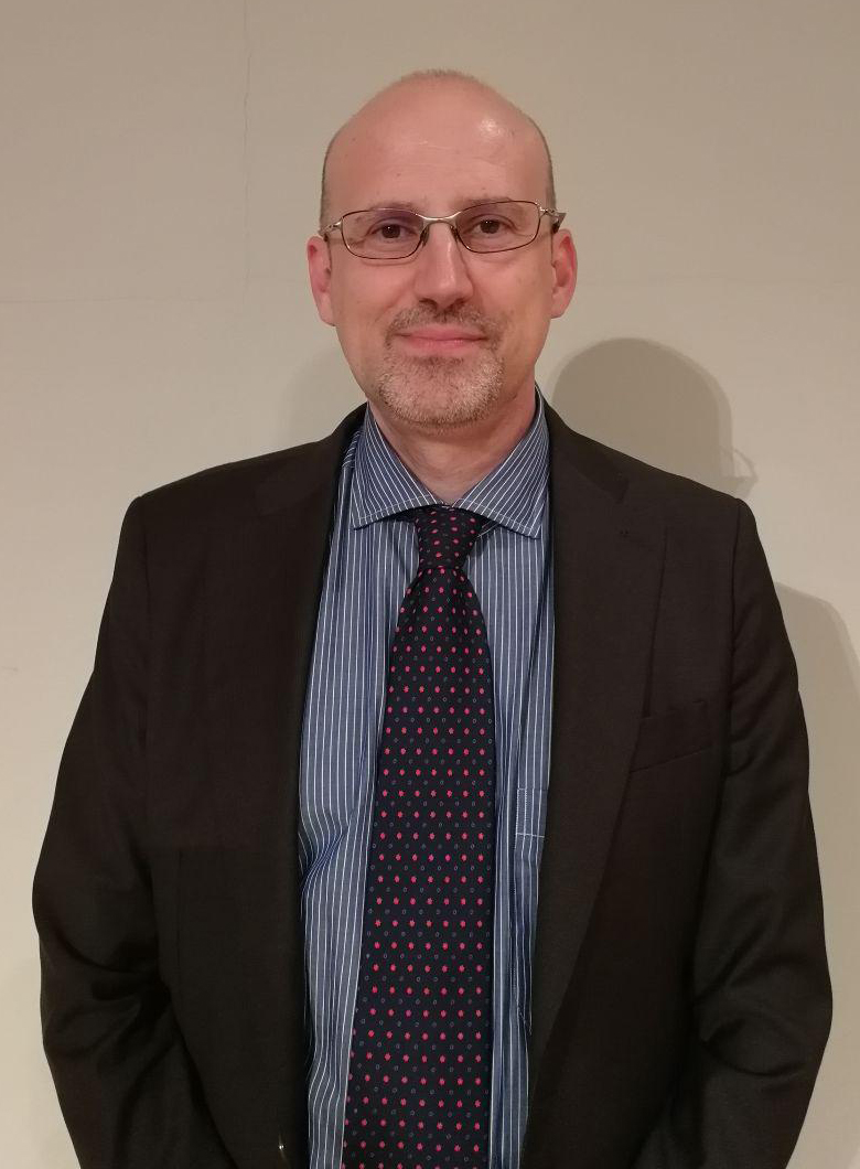 Nicolao Fornengo il 2 Lugio 2018 introduce la conferenza dedicata al vincitore del premio nobel per la fisica del 2015 Takaaki Kajita